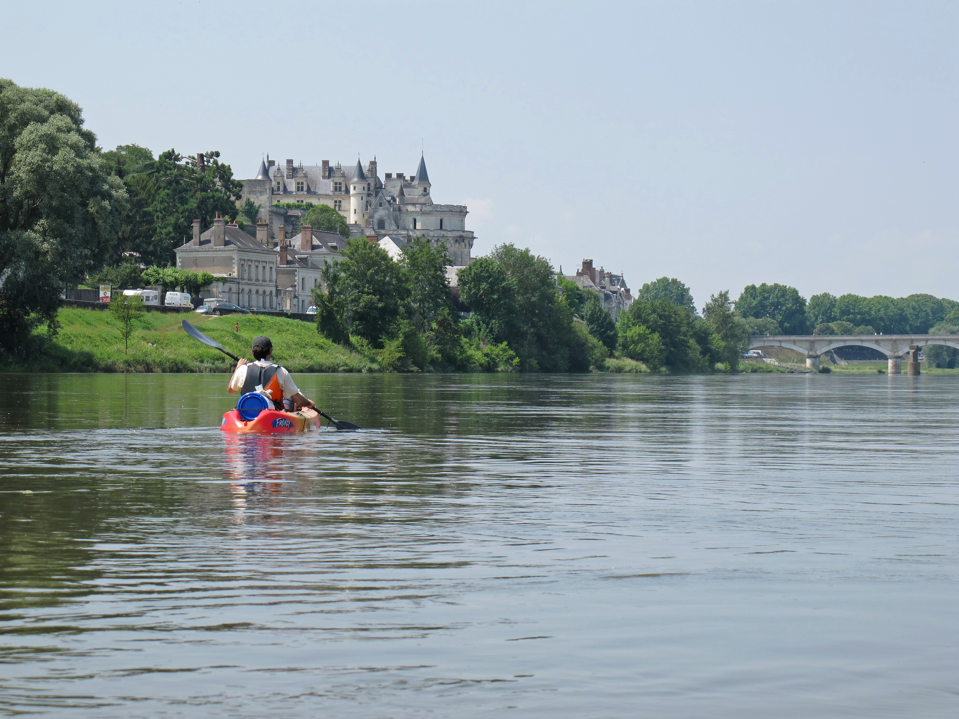 En 1848, à la suite d'un traité de reddition non respecté par les autorités françaises, l'émir Abd El-Kader et une centaine de compagnons furent placés en captivité dans le château. La parole de la France n'est pas tenue par les régimes et les gouvernements successifs. L'émir est retenu en captivité pendant cinq années. Au retour d'une tournée en France 16 octobre 1852, le futur Napoléon III vient annoncer solennellement sa liberté à l'émir. Après avoir fait serment, de ne plus perturber les opérations françaises en Algérie (décembre 1852), Abd El Kader part pour Brousse puis Damas où il enseigne la théologie à la mosquée des Omeyyades. In 1848, following a treaty of surrender not respected by the French authorities, the Emir Abd El-Kader and a hundred companions were placed in captivity in the castle. The word of France is not bound by the successive regimes and governments. The emir has held captive for five years. Returning from a tour in France October 16, 1852, the future Napoleon III has just announced solemnly freedom to the emir. After the oath, not to disrupt the French operations in Algeria (December 1852), Abd El Kader leaves for Brousse then left for Damascus where he teaches theology at the Umayyad Mosque.